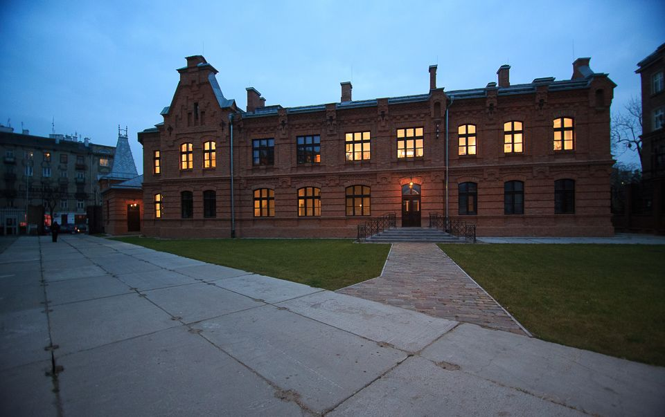 Centrum Praskie Koneser